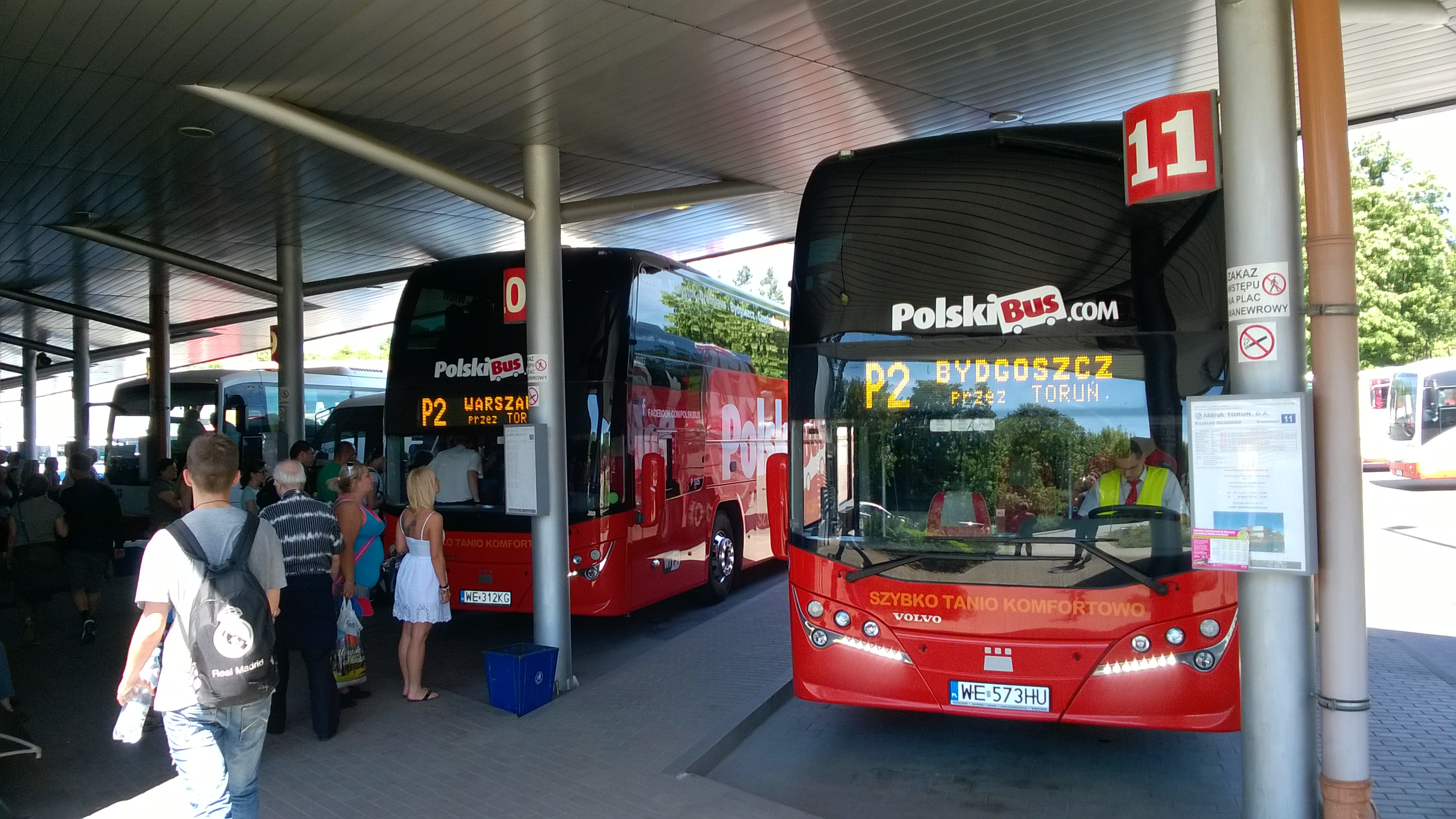 Dworzec autobusowy w Toruniu2